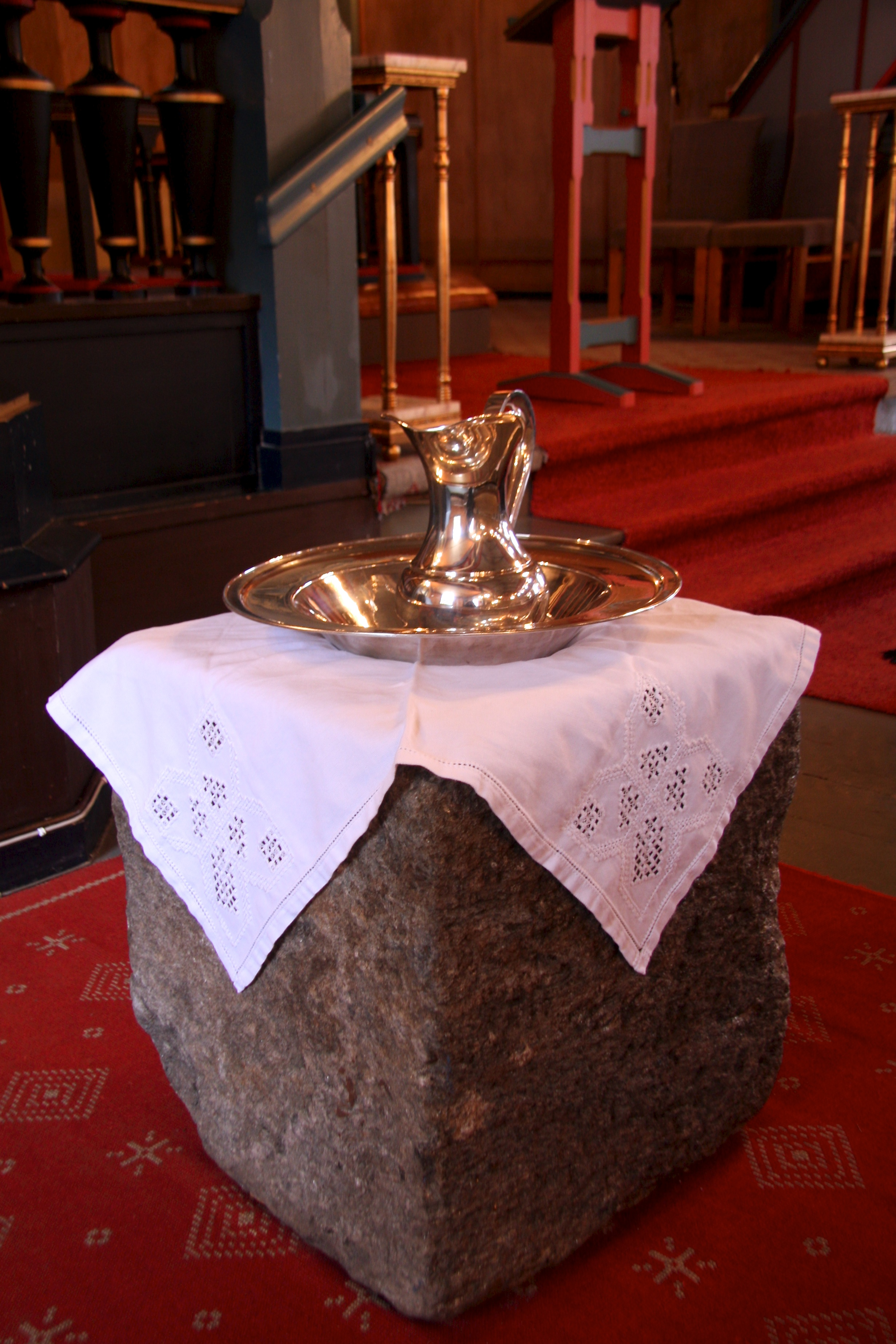 Døpefonten i Gulen kirke